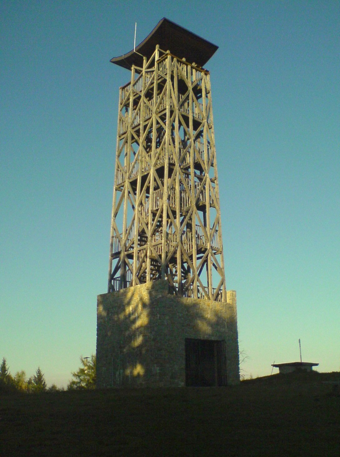 Pohľad na rozhľadňu na vrchu Veľký Lopeník